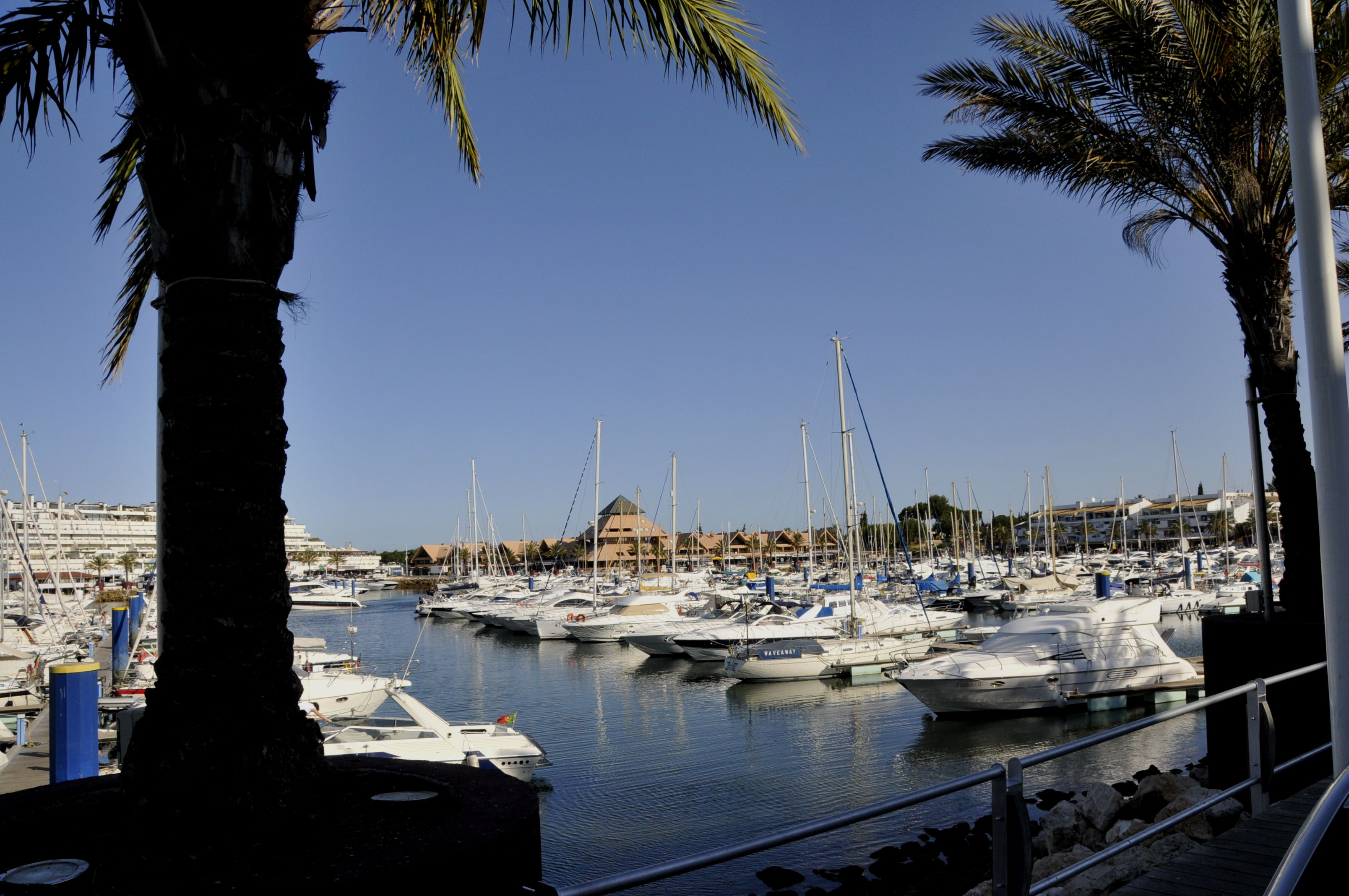 Yachthafen in Vilamouro